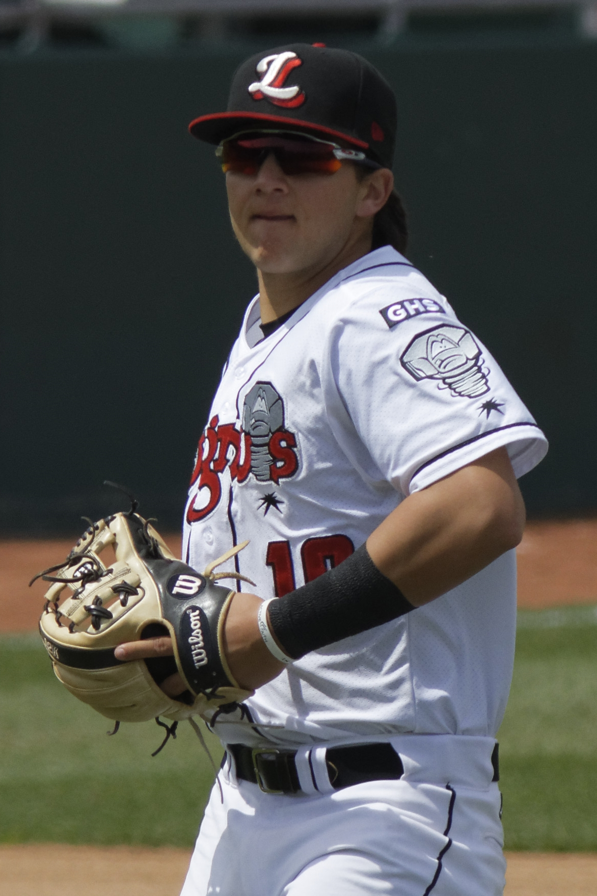 Peoria @ Lansing 05032017